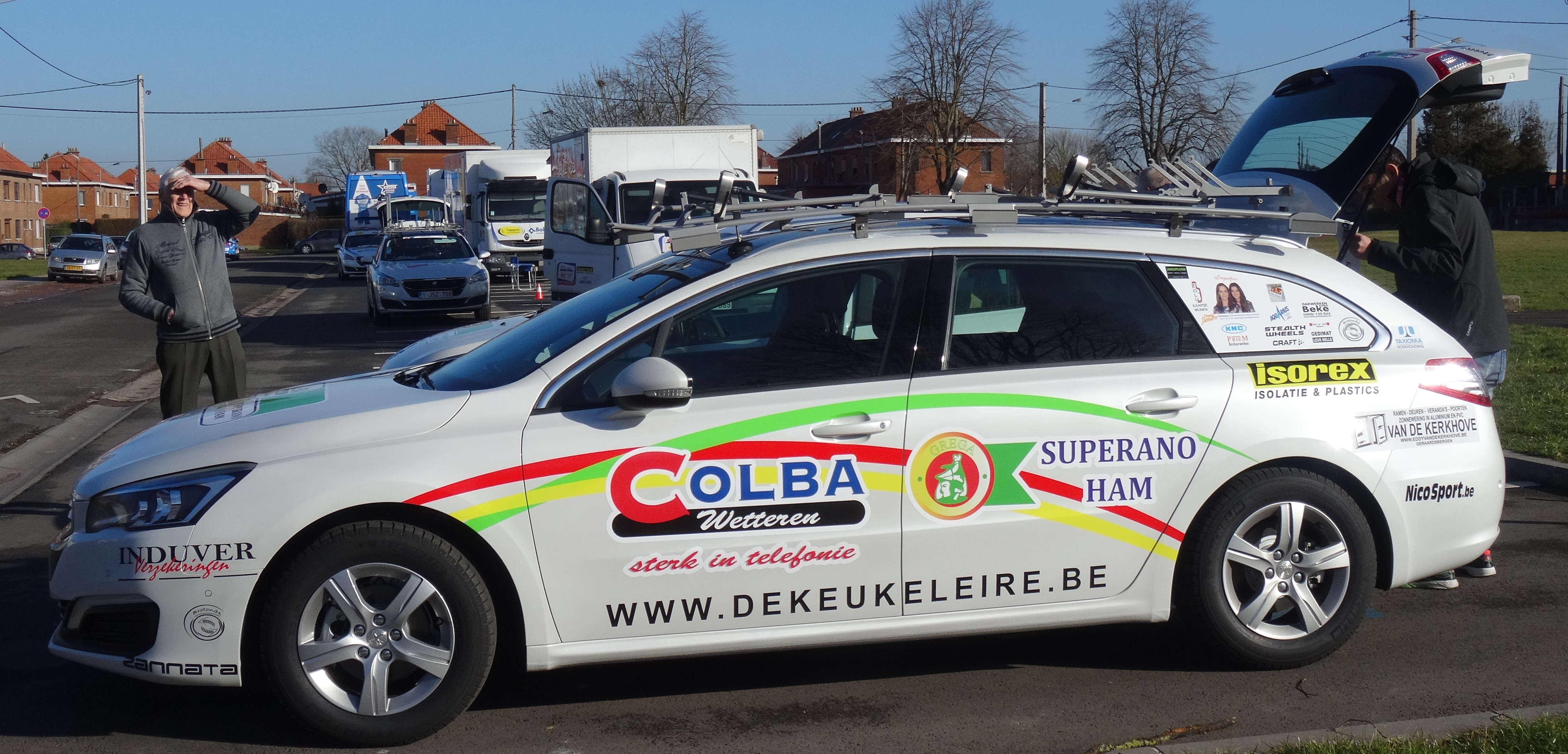 Reportage réalisé le mercredi 4 mars à l'occasion du départ du Samyn des Dames 2015 et du Samyn 2015 à Quaregnon, Belgique.